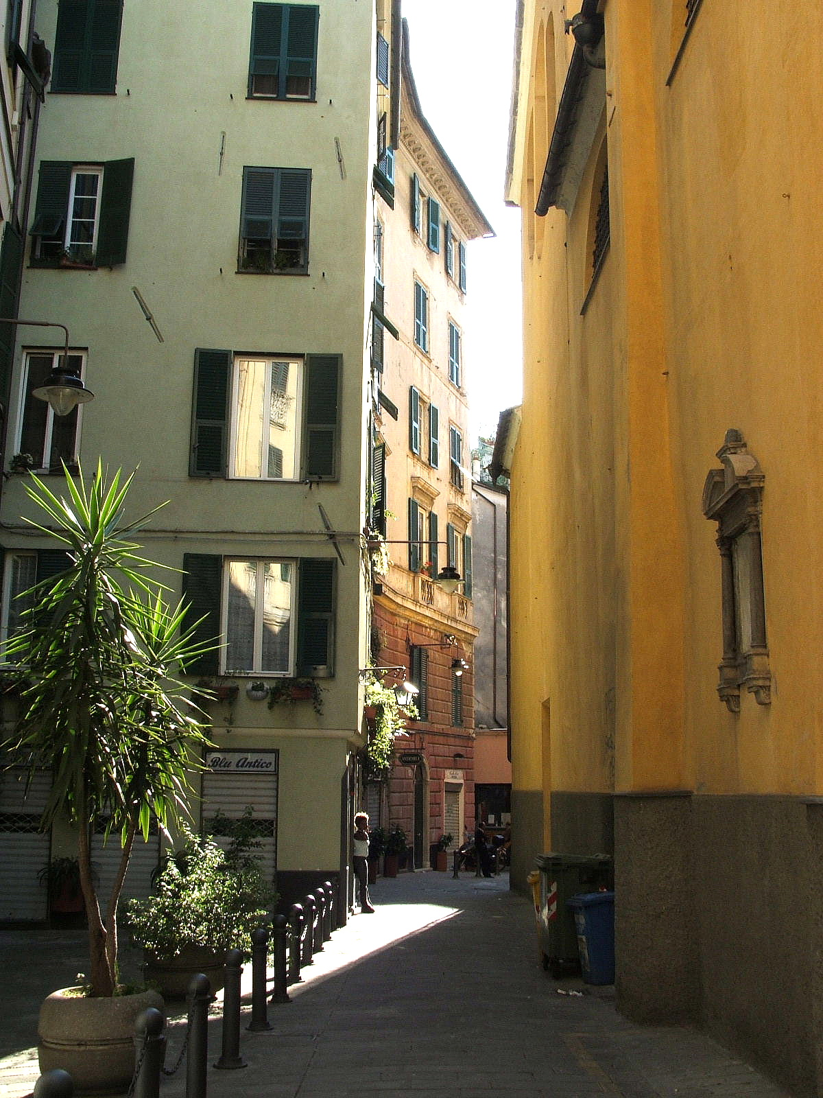 Genova Caratteristico caruggio genovese - via della Maddalena - al tardo pomeriggio